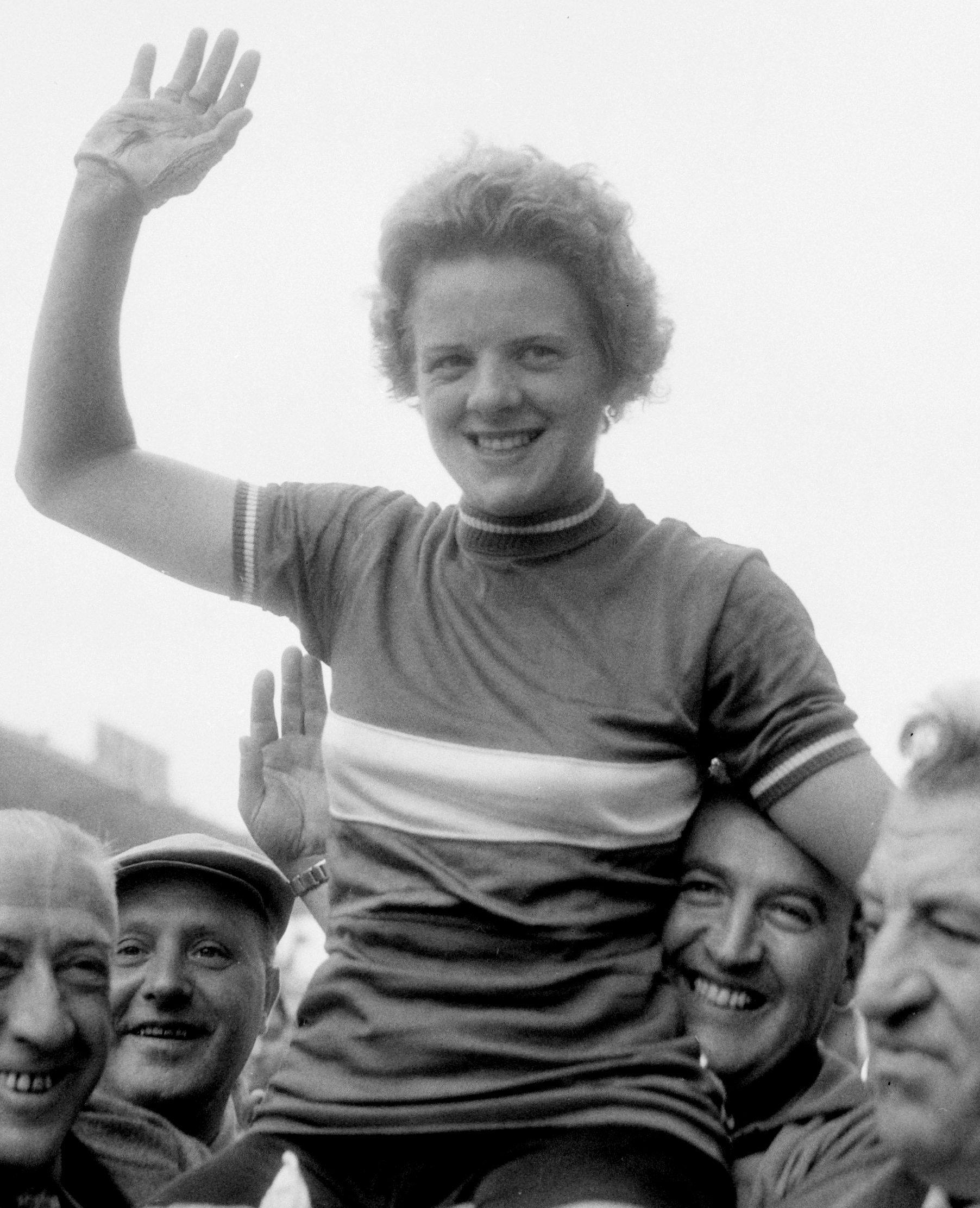 Wereldkampioenschappen amateurs dames op de weg te Reims wereldkampioene Elsy Jacobs